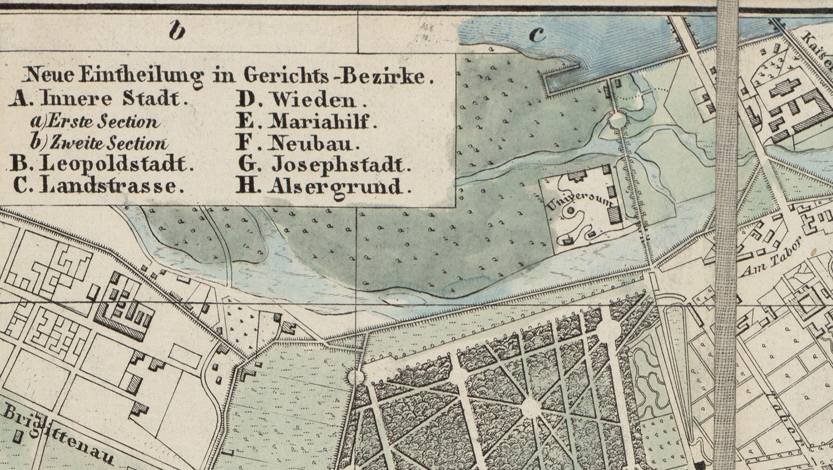 Stadtplan - Neuester Plan von Wien und seinen Vorstädten. 1852. Der Ausschnitt zeigt die Brigittenau. Oben das Fahnenstangenwasser mit dem Universum. Hier verläuft etwa die heutlige Nordwestbahnstraße.